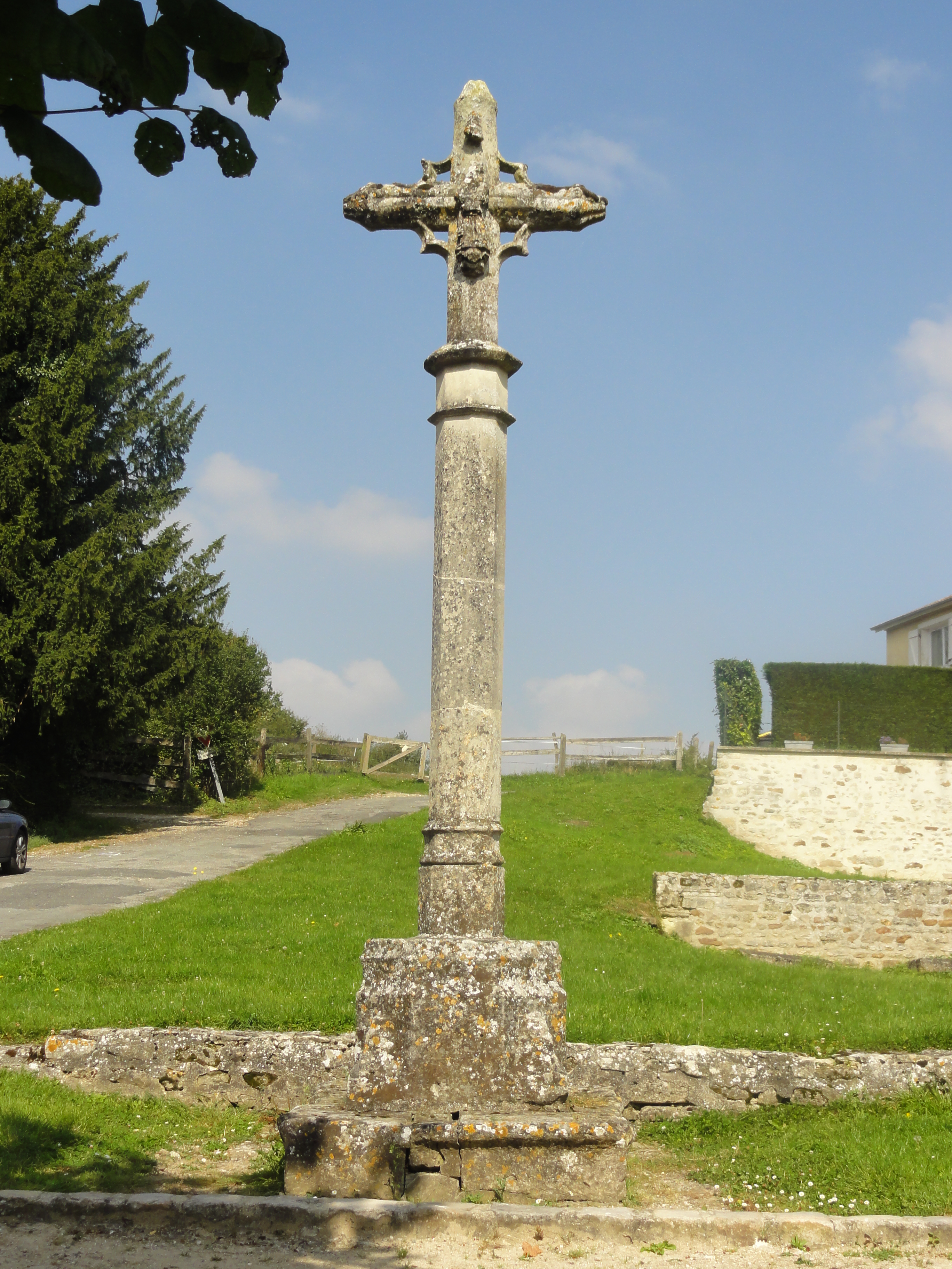 Le calvaire, ancienne croix de cimetière, devant le portail occidental de l'église.